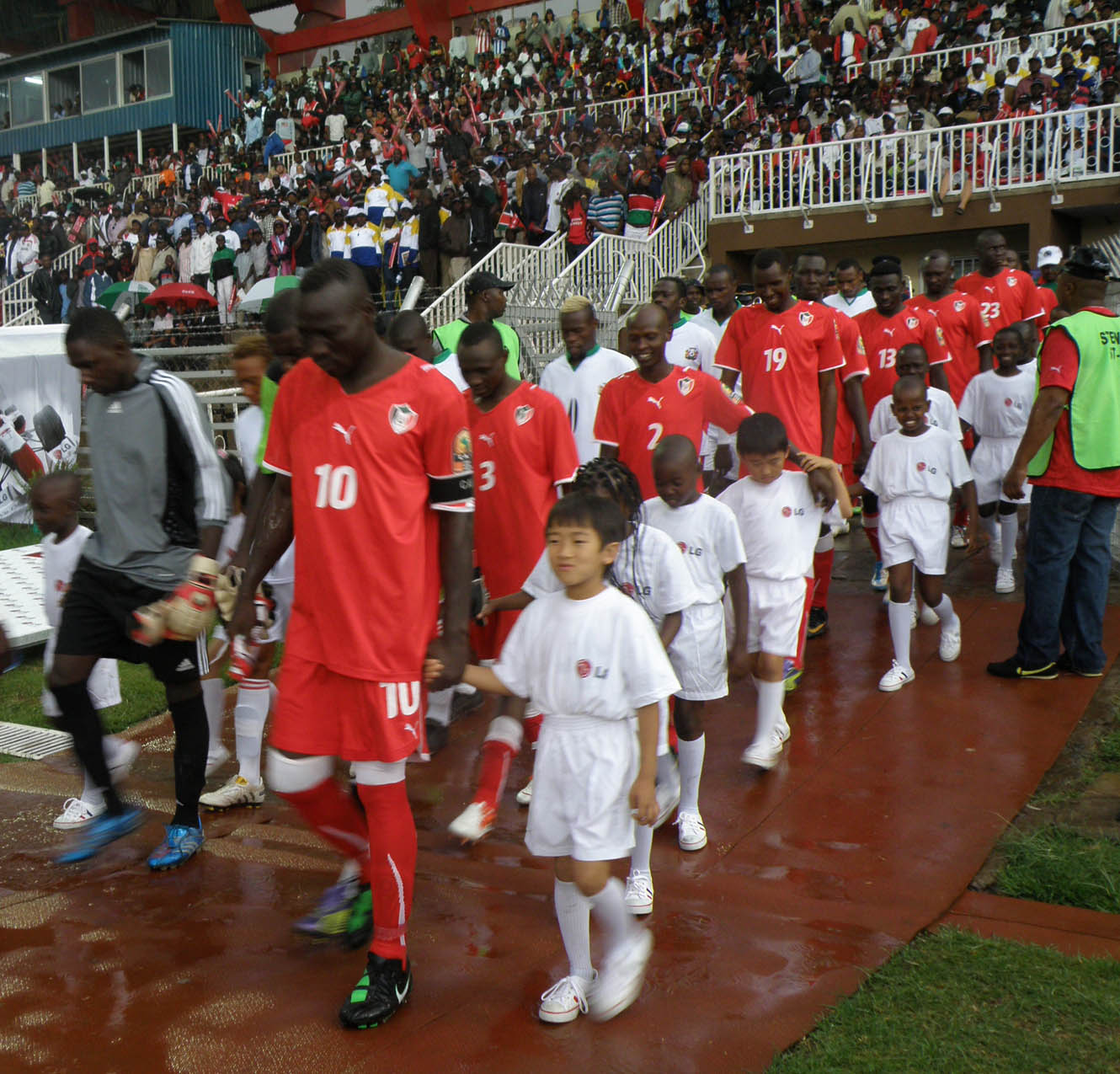 LG전자가 동아프리카에서 케냐와 수단간 국가대표 축구 친선경기 개최하고 고아원생들을 초청하는 등 사회공헌활동을 펼쳤다. LG전자가 25일(현지시각) 케냐 나이로비에서 개최한 'LG 컵 아프리카 2011' 친선 경기에 케냐와 수단 축구 국가대표팀 선수단이 입장하고 있다. ※ LG전자 뉴스룸 에서 관련 보도자료를 확인실 수 있습니다.